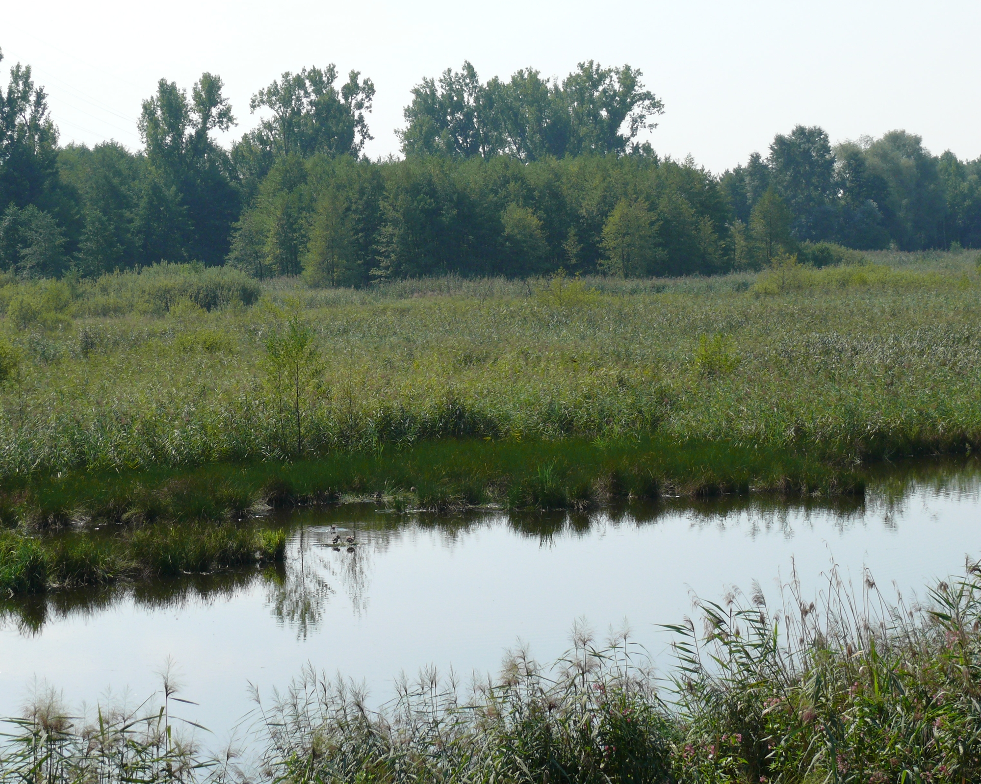 Federbachbruch bei Muggensturm